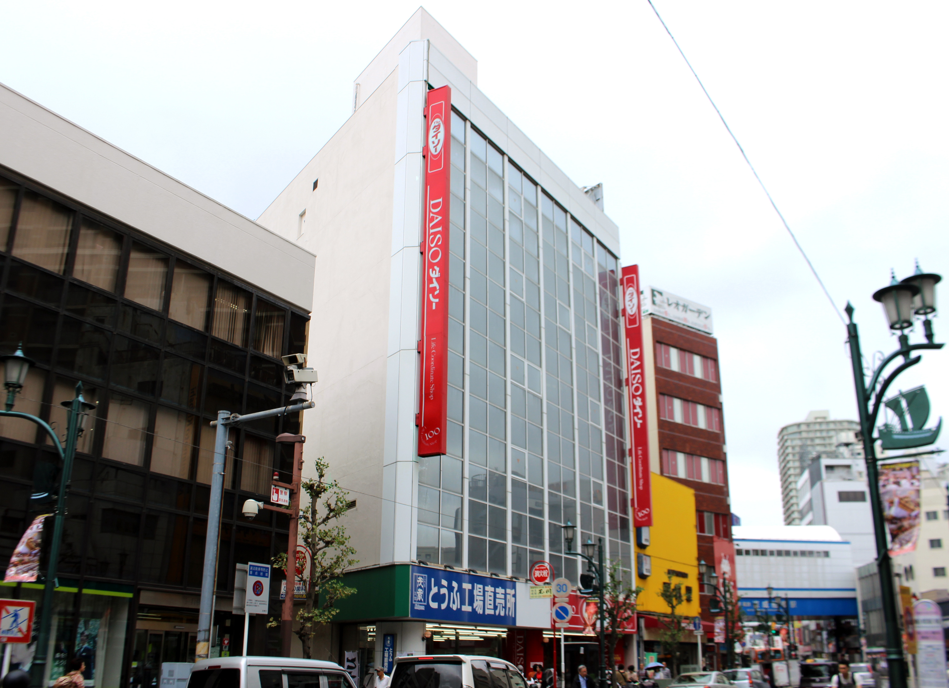 ダイソーギガ船橋店 Daiso Giga Funabashi 20190708